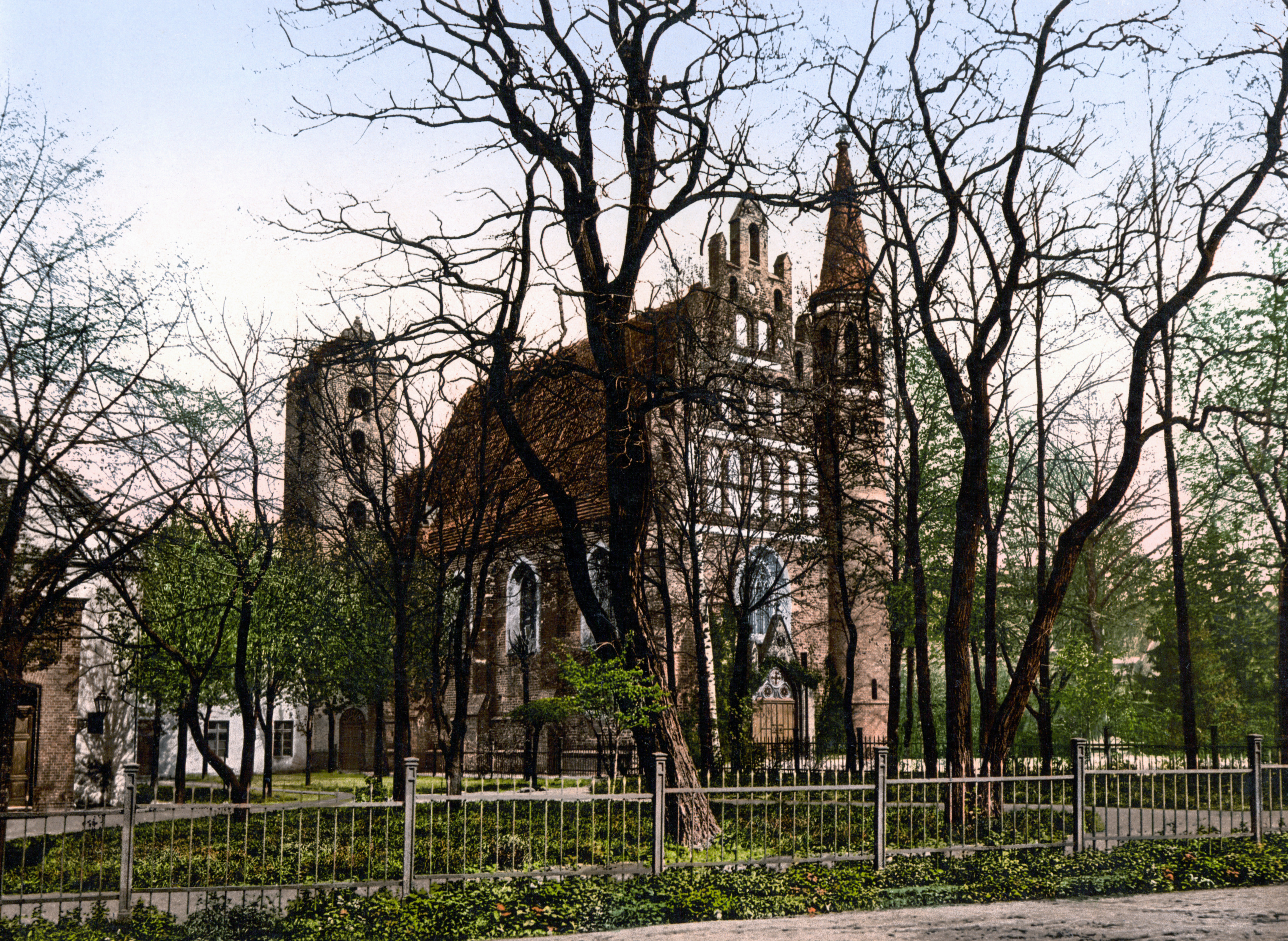 Bromberg Garnisonskirche